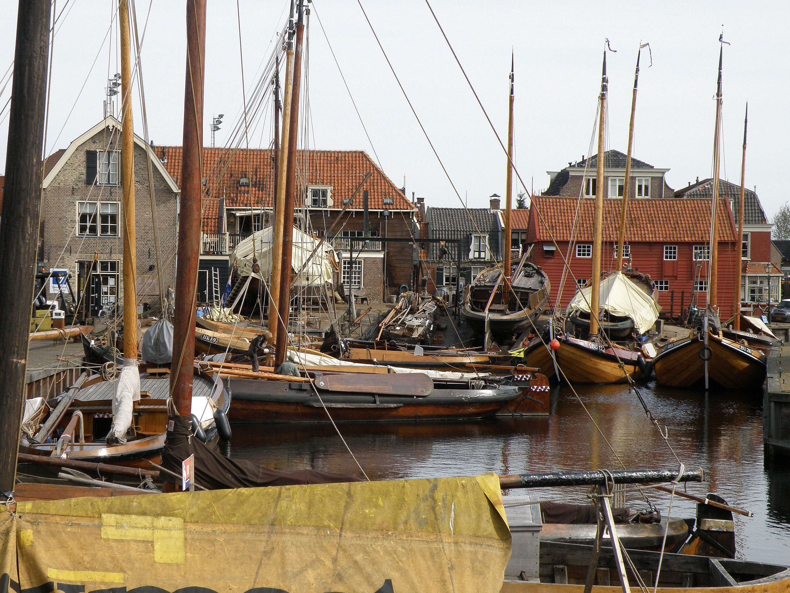 Spakenburg, gemeente Bunschoten (prov. Utrecht, Nederland). De Oude Haven, met zicht op de Botterwerf. VVV-kantoor, links.